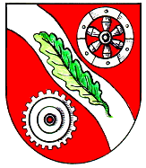 Das Wappen dokumentiert den Ortsnamen durch den Schrägwellenbalken (= Hinweis auf die Aschaff) und das Eichenblatt (= gleichzeitig Hinweis auf die Lage); die frühere Territorialzugehörigkeit zum Erzstift Mainz wird durch das sog. Mainzer Rad dargestellt. In Rot ein silberner Schrägwellenbalken, belegt mit einem schräg liegenden grünen Eichenblatt; oben ein sechsspeichiges silbernes Rad, unten ein silbernes Zahnrad. Die neuzeitliche Entwicklung der Gemeinde zum Industriestandort wird durch das Zahnrad als Industriesymbol versinnbildlicht.